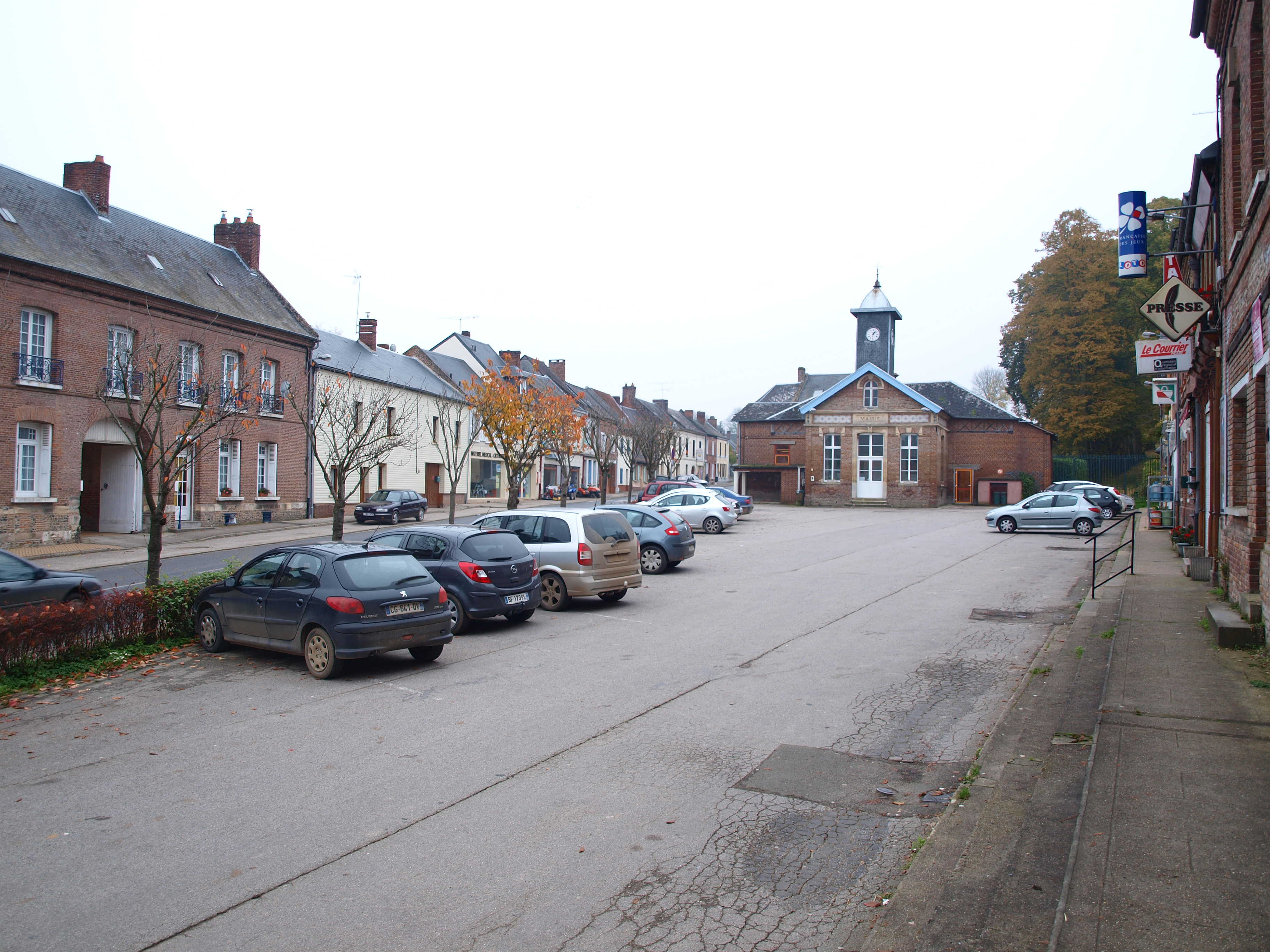 Senarpont (Somme, France) ; la place du général Leclerc.